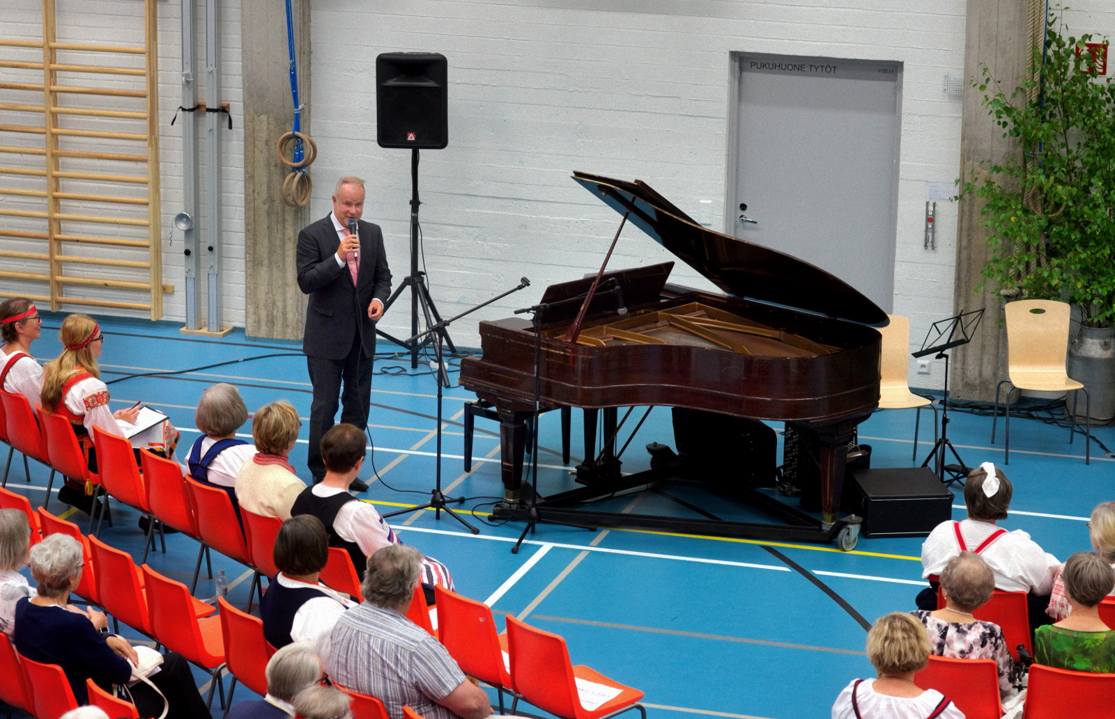 Petri Laaksonen, Johannes-juhlat Paimiossa 5.8.2017